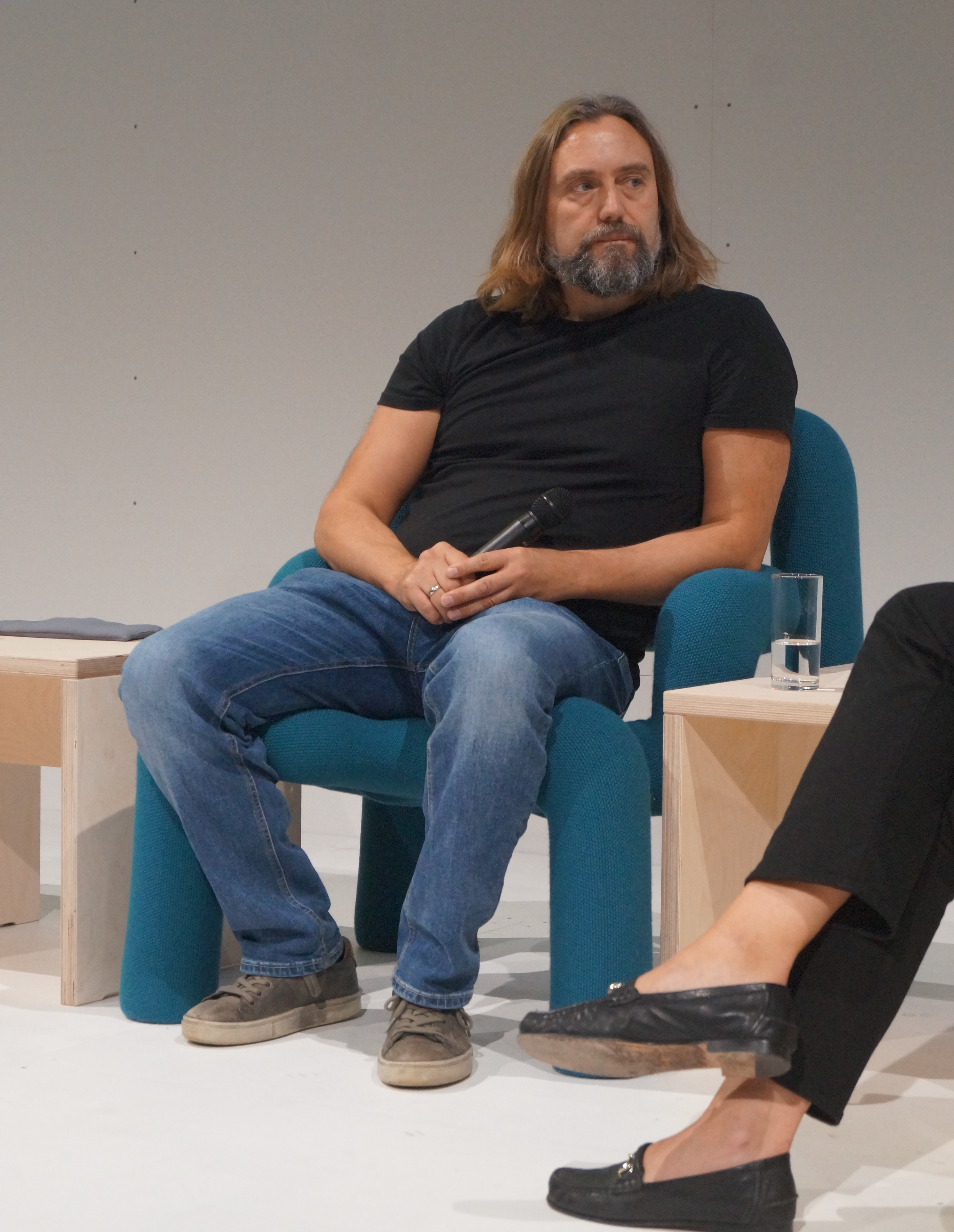 Carl Frode Tiller auf der Frankfurter Buchmesse 2019